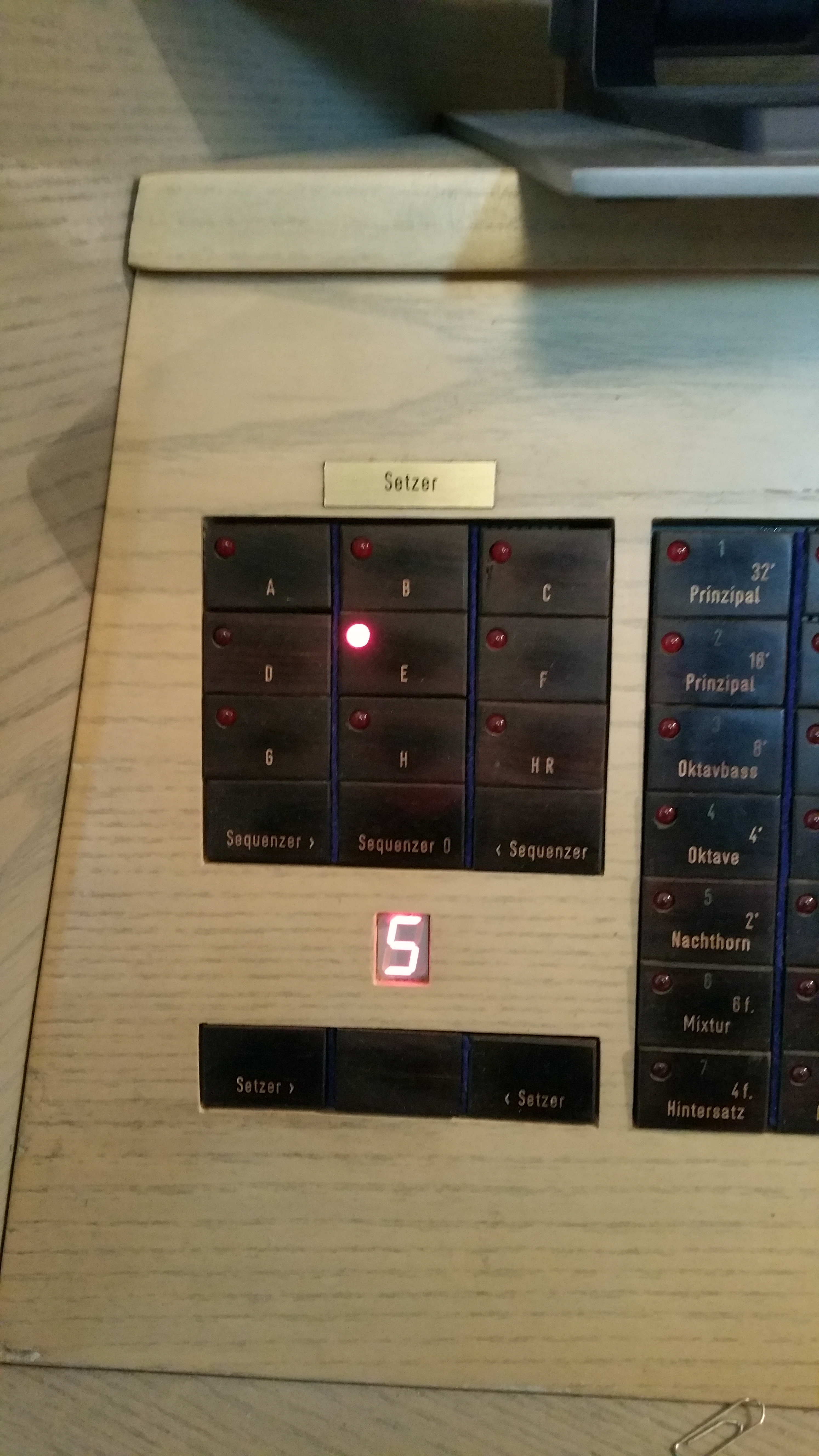 Nahaufnahme der Setzertaster der Orgel, evangelische Immanuel-Kirche Dortmund Marten